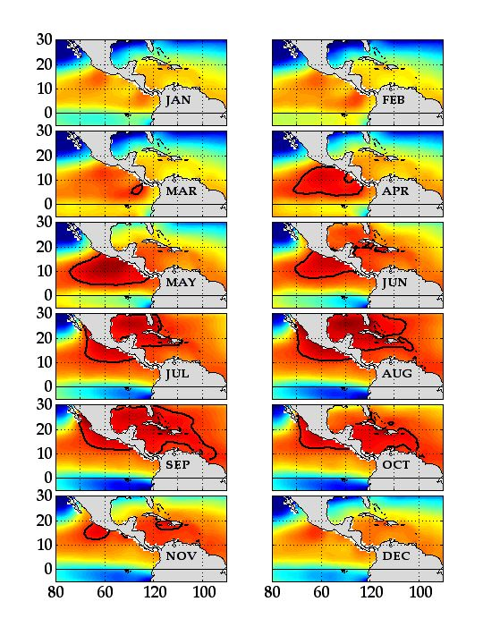 Western Hemisphere Warm Pool development.